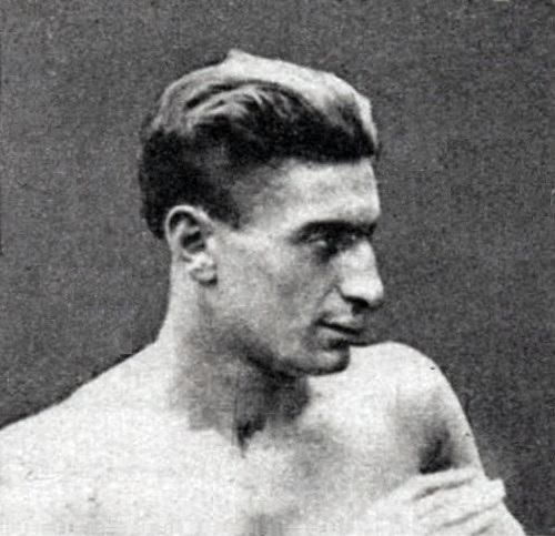 Xavier Éluère en 1920.